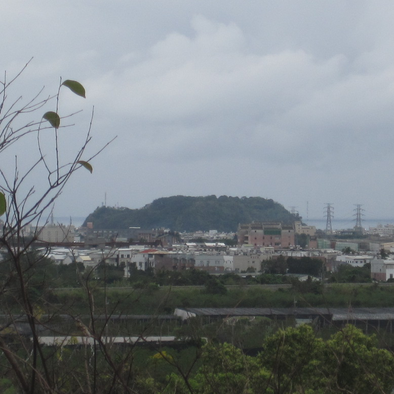 從卑南文化公園遠眺的鯉魚山